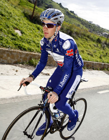 Foto van Carlos Abellán.